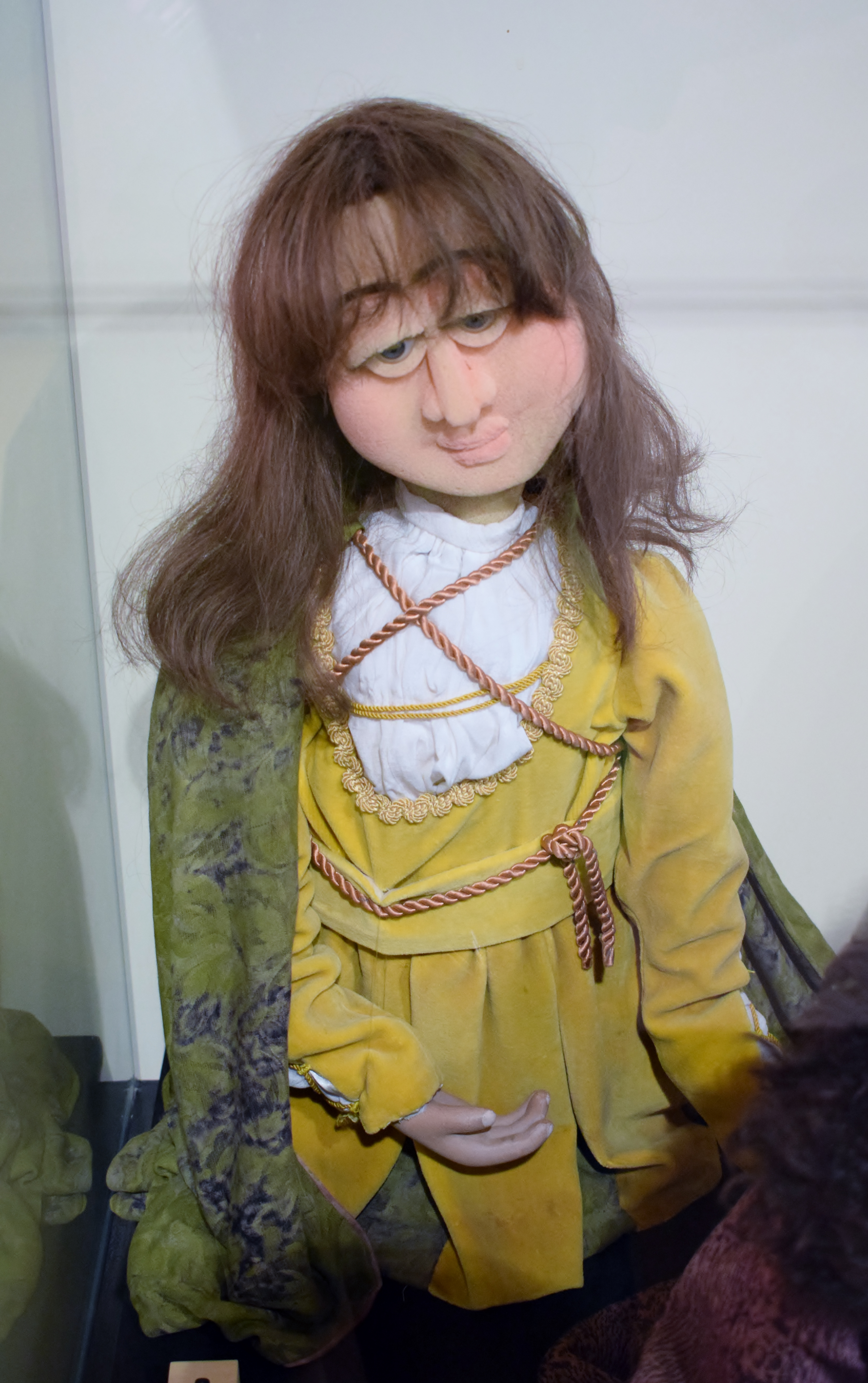 Titelles dissenyats per a la producció televisiva «Tirant lo Blanc» (1991) de la qual es va produir només el capítol pilot (de tretze previstos).